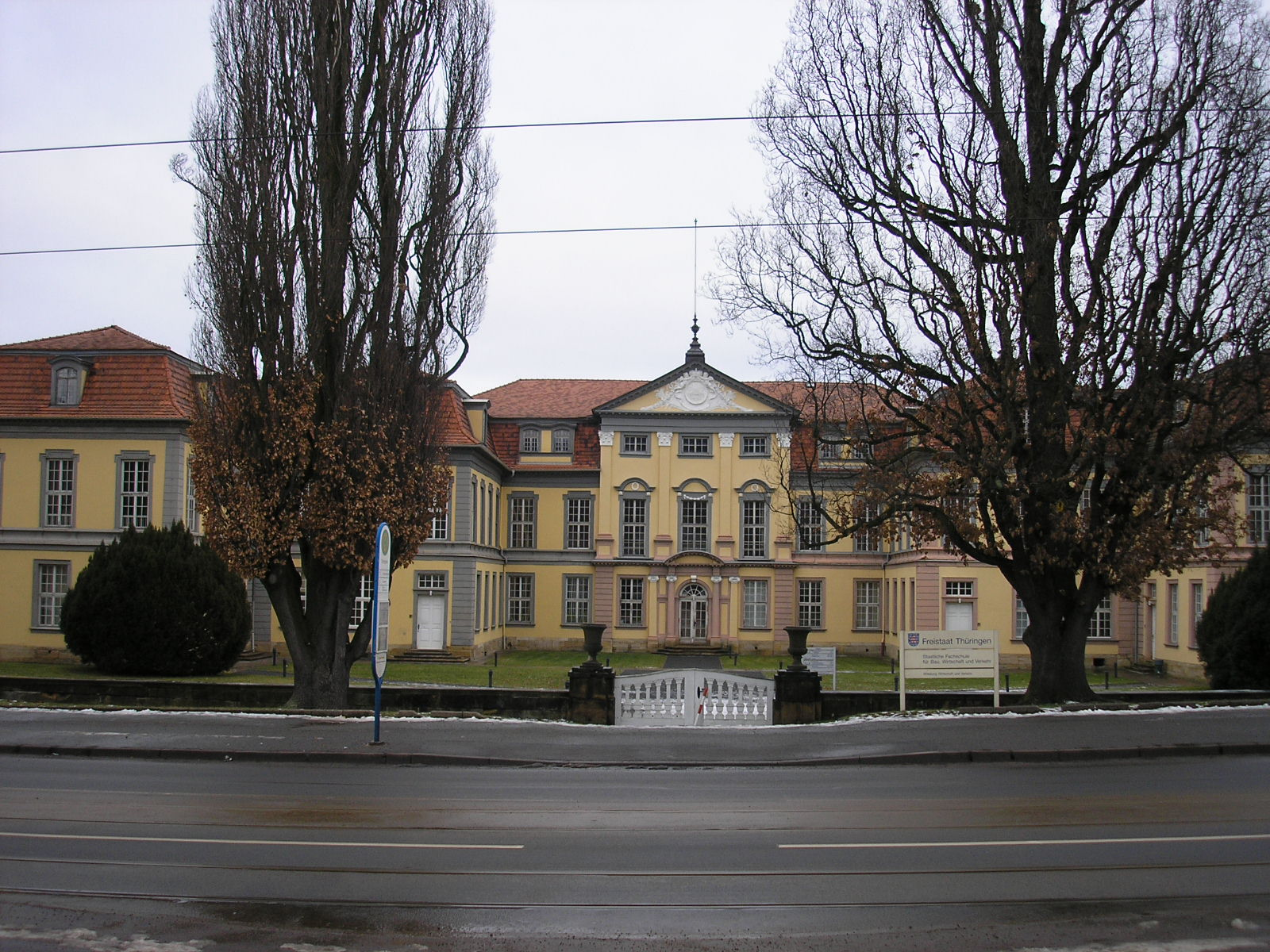 Schloss Friedrichsthal in Gotha (Thüringen).